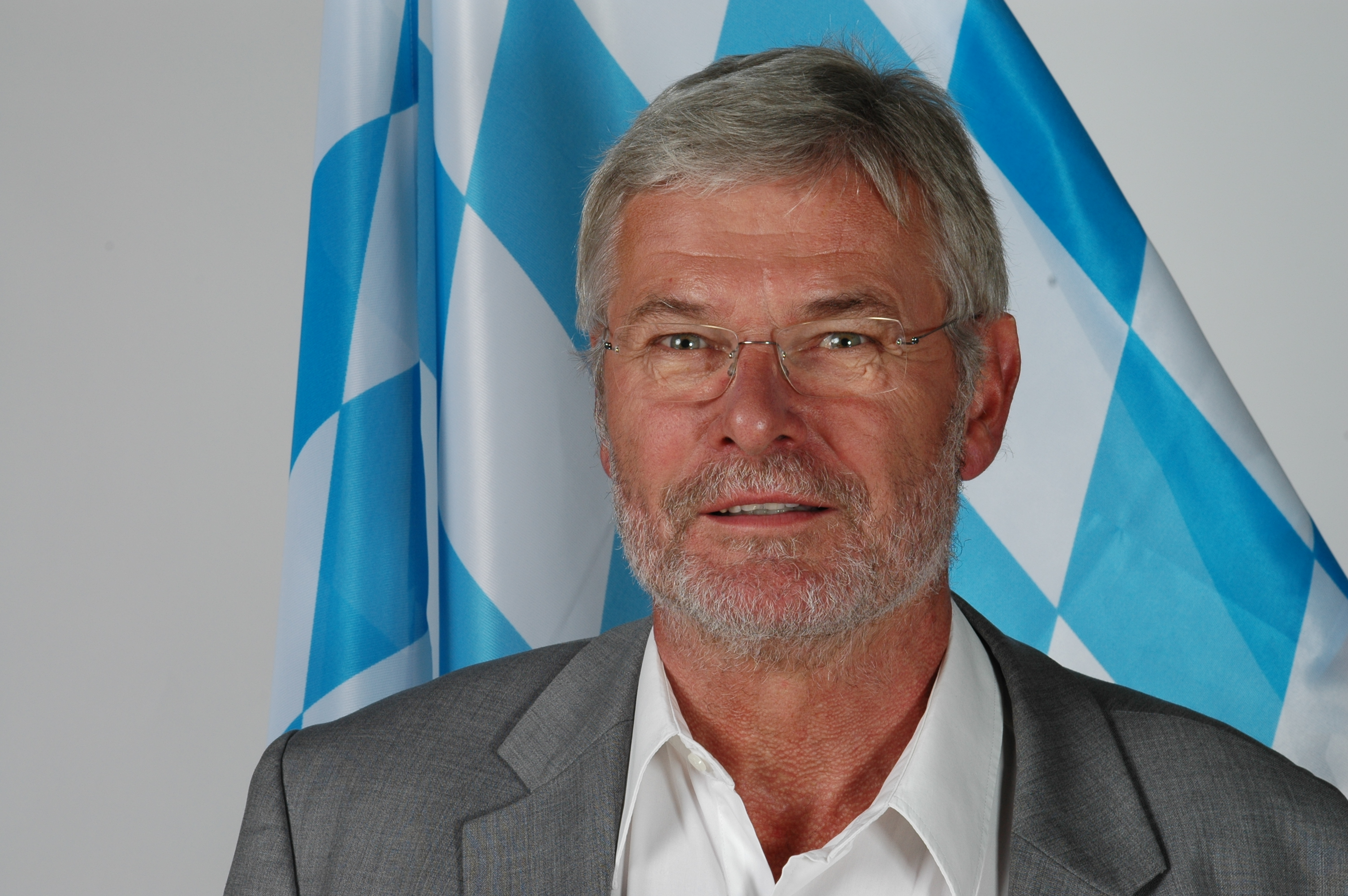 Adi Sprinkart, Juli 2012, Landtagsprojekt Bayern 2012.